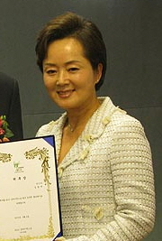 2010 상하이엑스포 개최기념 기자회견